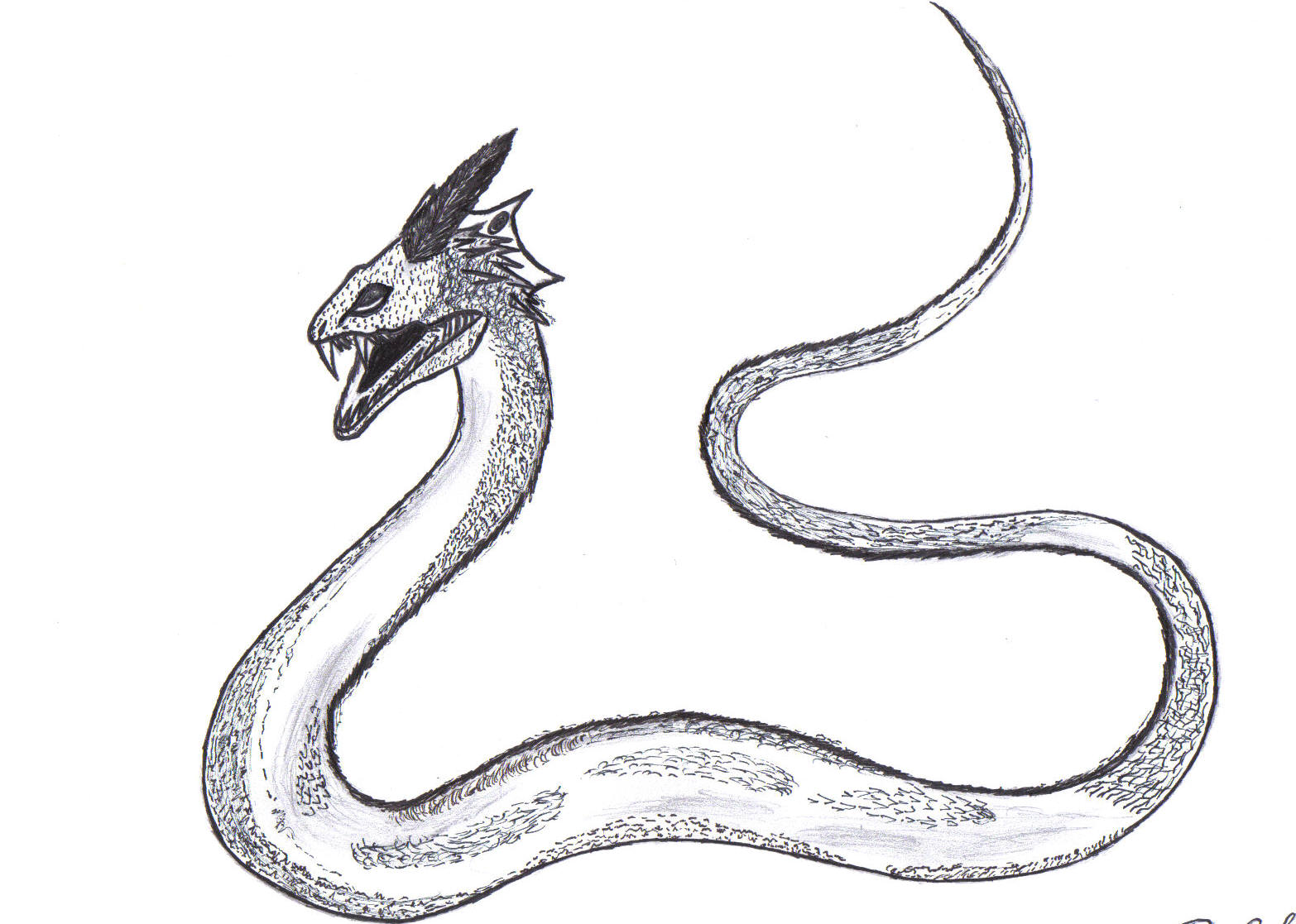 Desenho de basilisco por Rodrigo Ferrarezi